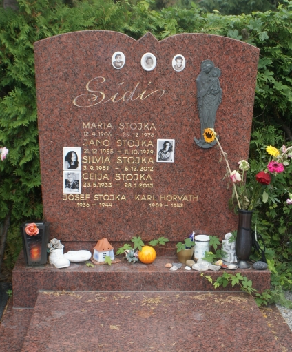 Margarete Horvath_Stojka-Groß-Jedlersdorfer Friedhof (13-2-10)